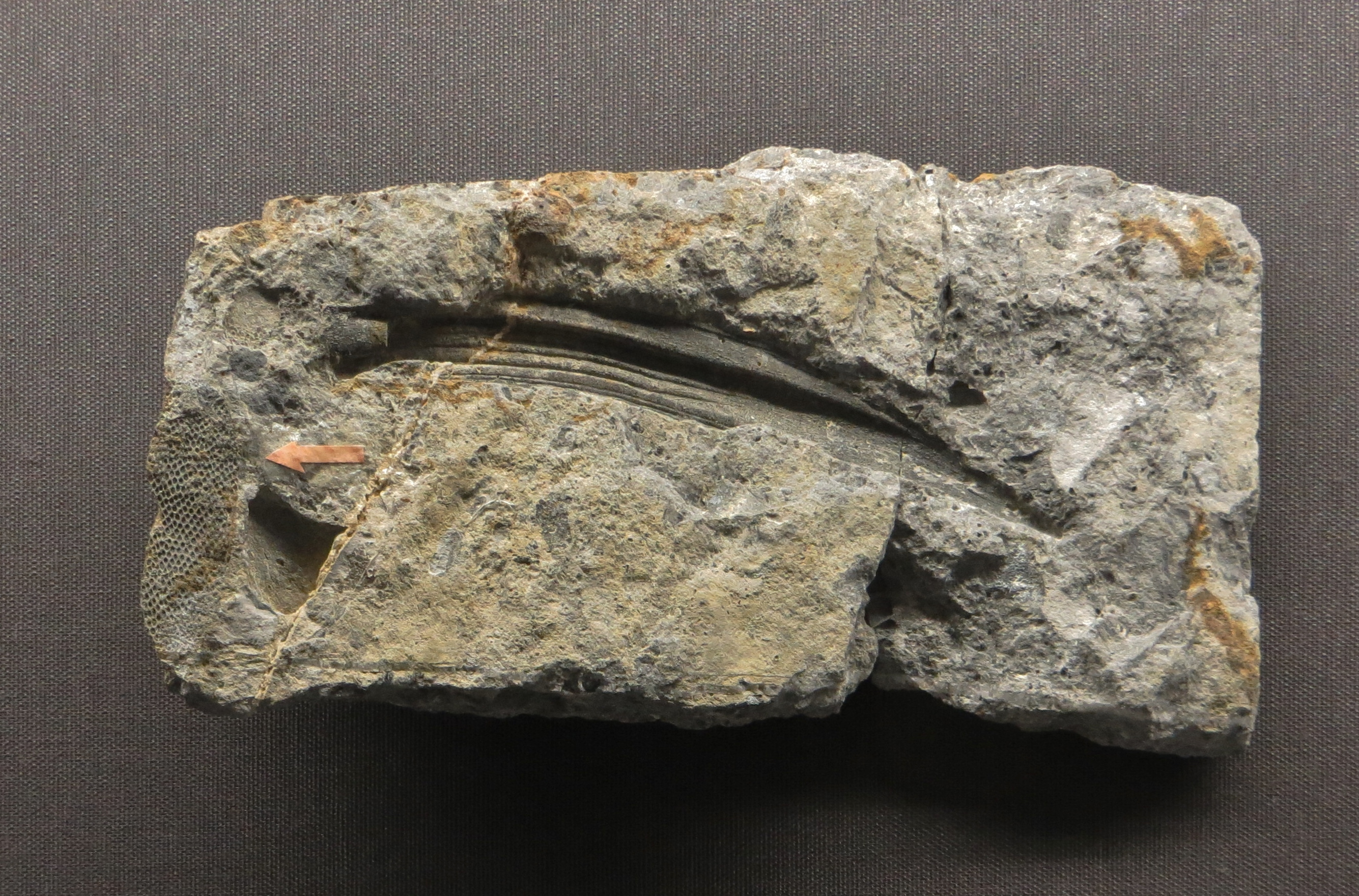 Fossil of Machaeracanthus- Took the picture at Natural History Museum, Wiesbaden